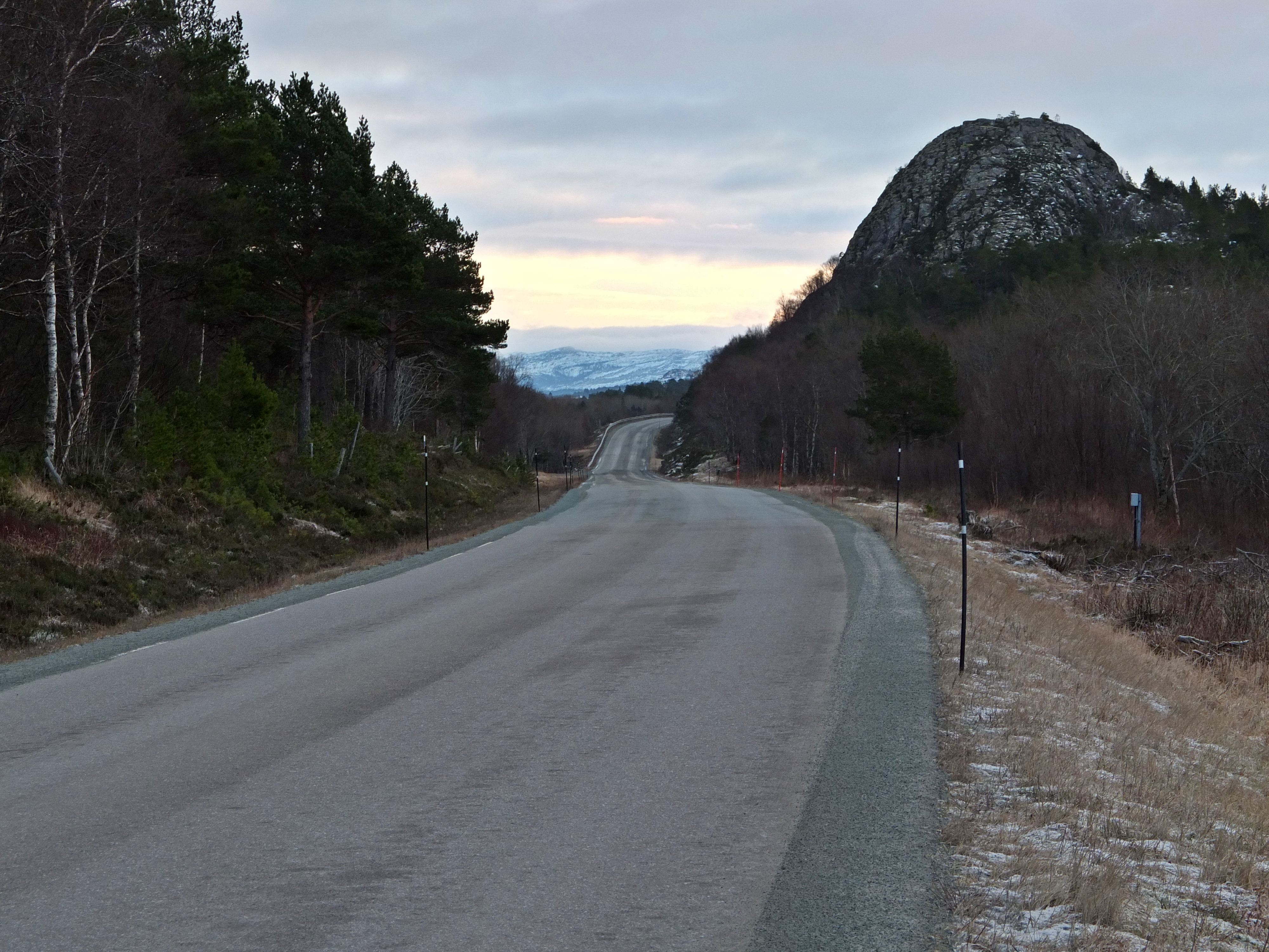 Fylkesvei 721 i Bjugn, ved Ryvatnet